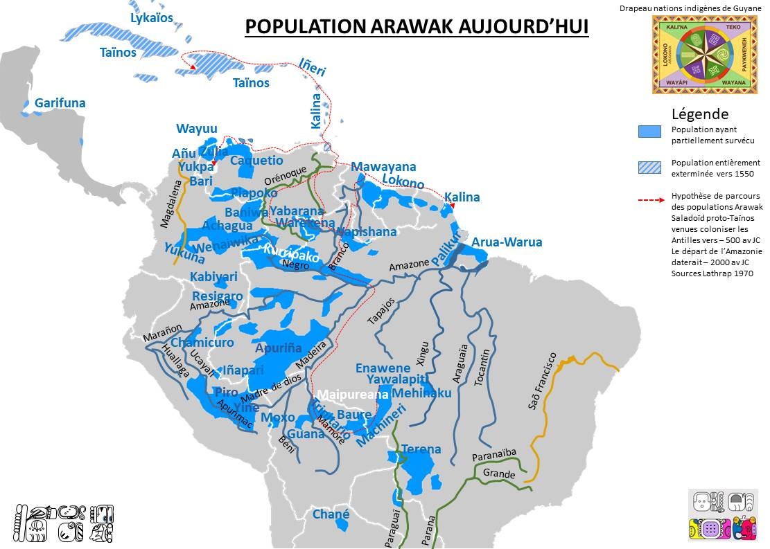 Nomme les groupes Arawak d'Amérique du Sud. Caractérise leur inscription sur réseau hydrographique Amazone-Orénoque qui a servi de structure de colonisation de la forêt depuis plus de 30 000 ans. Signale les groupes disparus au moment de la colonisation des Caraïbes.